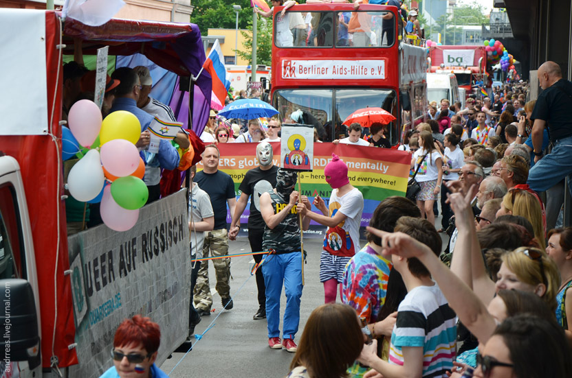 Berliner CSD 2012